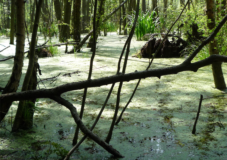 Feuchtgebiet, NSG Wocknin See, Usedom, Landkreis Vorpommern-Greifswald